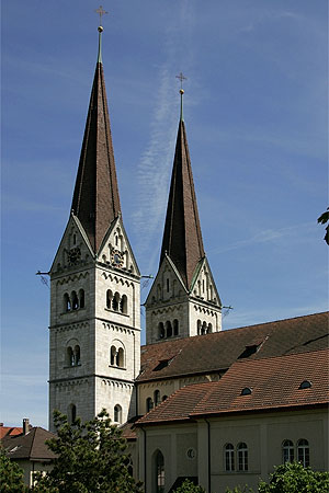 Olten: Röm.-kath. Kirche St. Martin